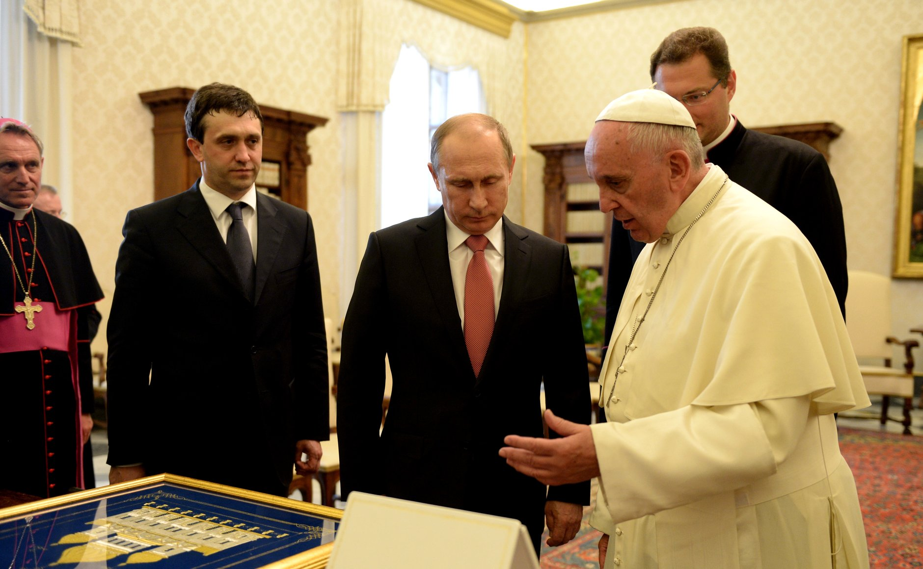 Встреча Президента России Владимира Путина с Папой Римским Франциском